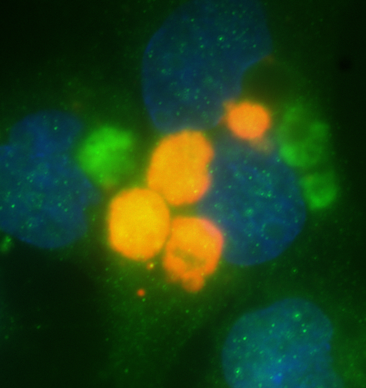 אנדוציטוזה בתאים איקריוטיים. בכחול: גרעין התא, בירוק: חלבון G המשתתף בתהליך, באדום: סוכר שהוכנס לתא בתהליך האנדוציטוזה.